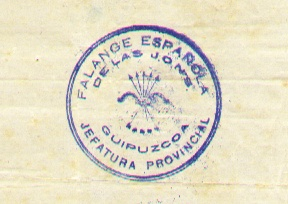 Stempel eines Dokuments der Falange Española de las JONS. 17.10.1936